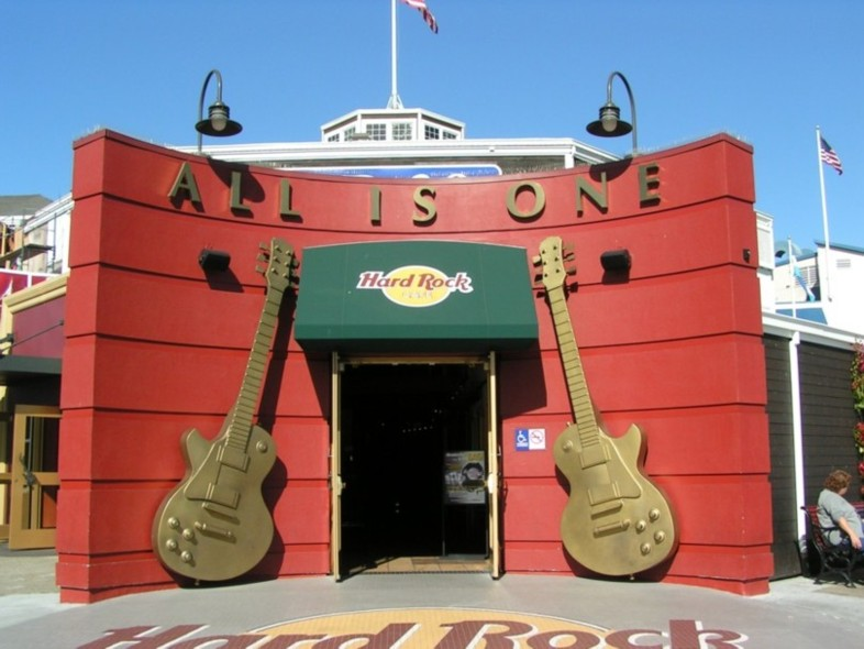 GNU-FDL, selbstfotografiert Hard-Rock-Cafe in San Francisco am Pier 39